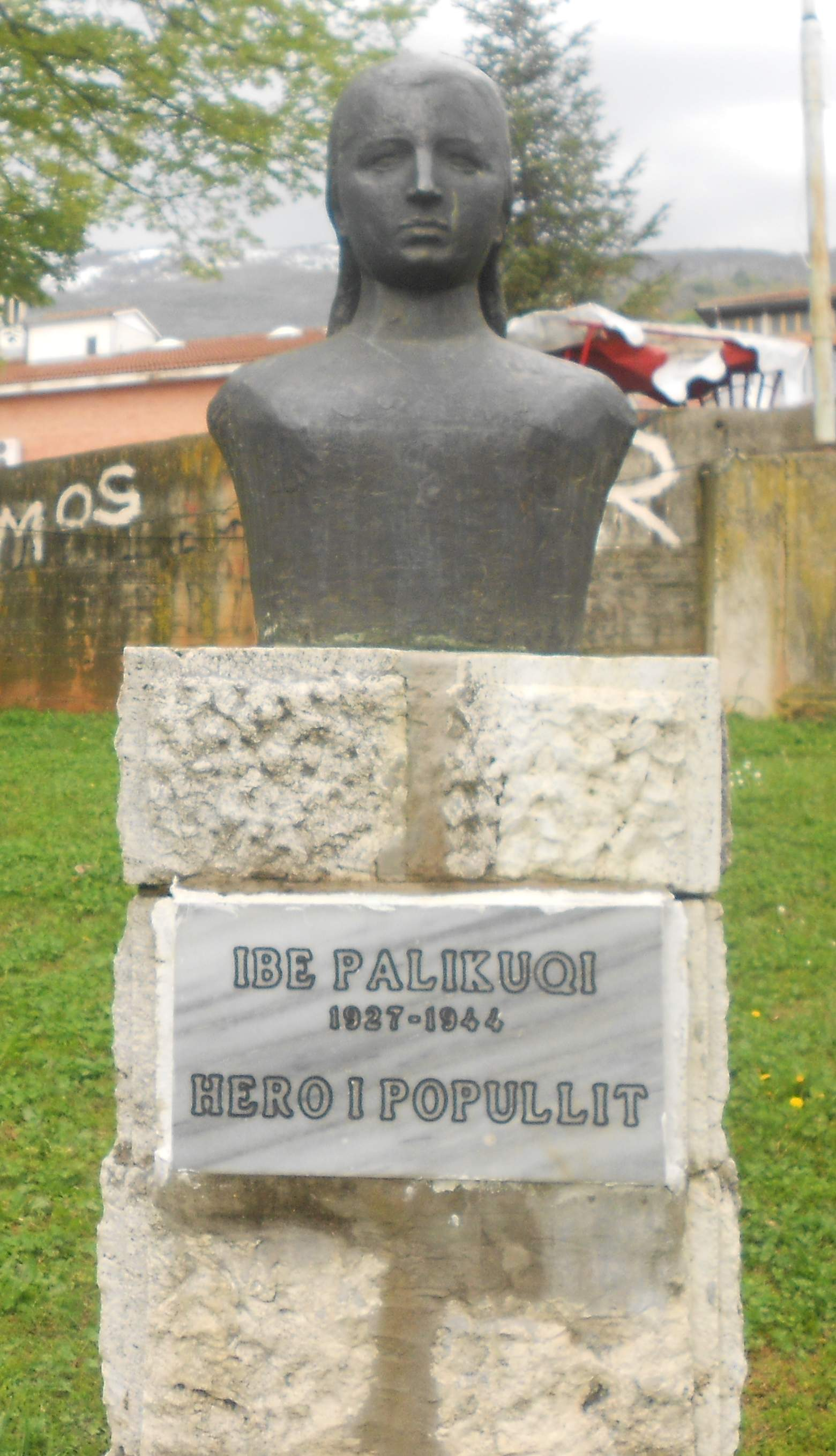 Биста на Ибе Паликуќа во Дебар